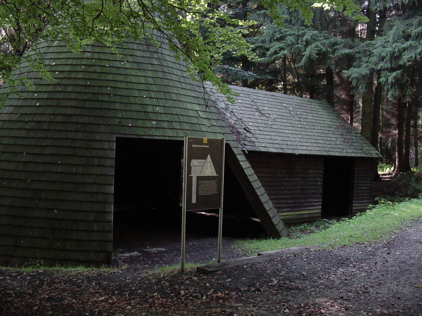 Göpelschacht Moses auf dem Bergbaurundweg im Muttental.